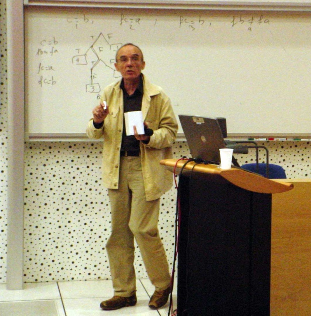 Jean Pierre Jouannaud faisant un exposé le 29 mai 2008